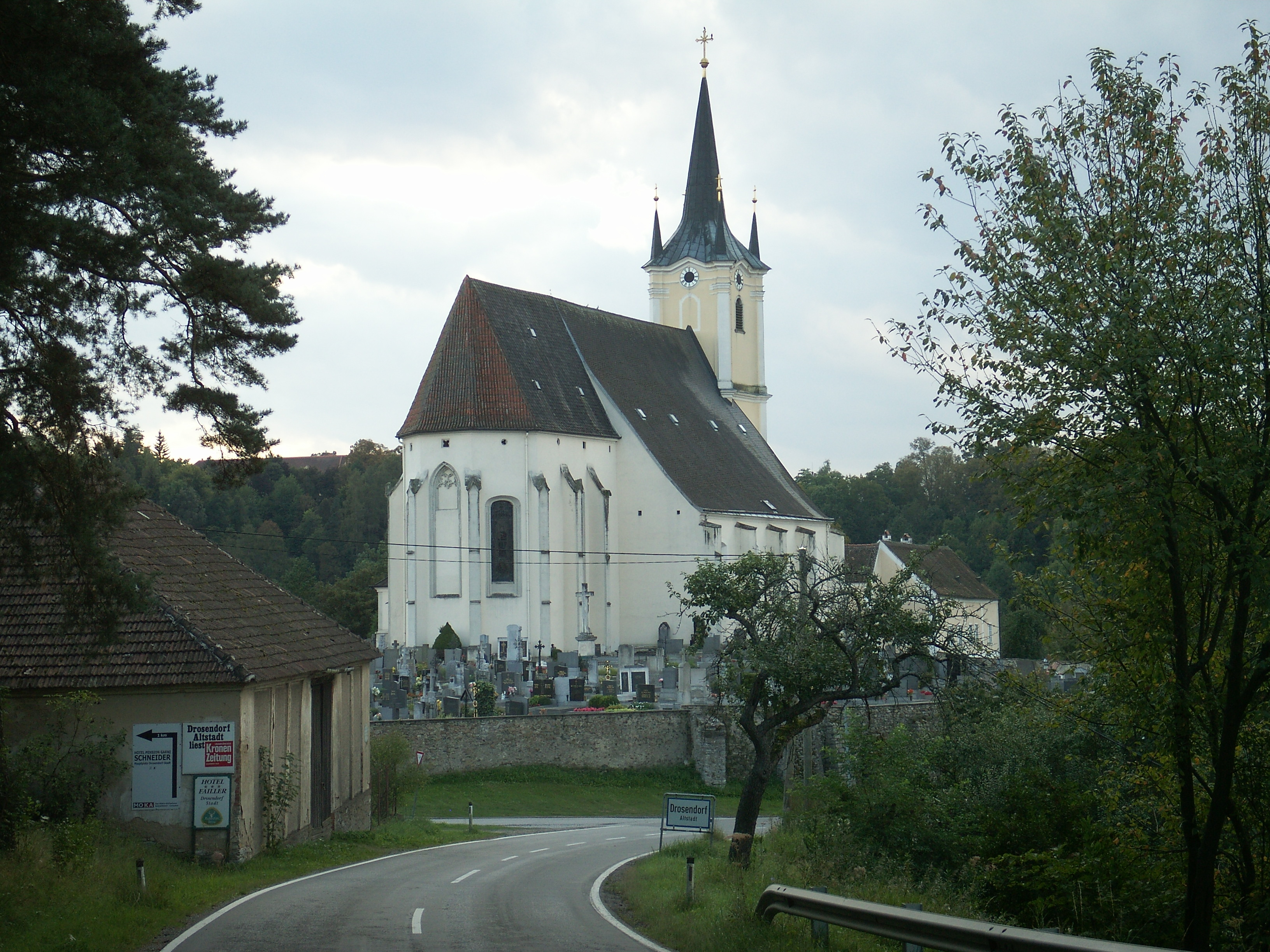 Altstadtkirche St. Peter und Paul in Drosendorf an der Thaya (Niederösterreich)